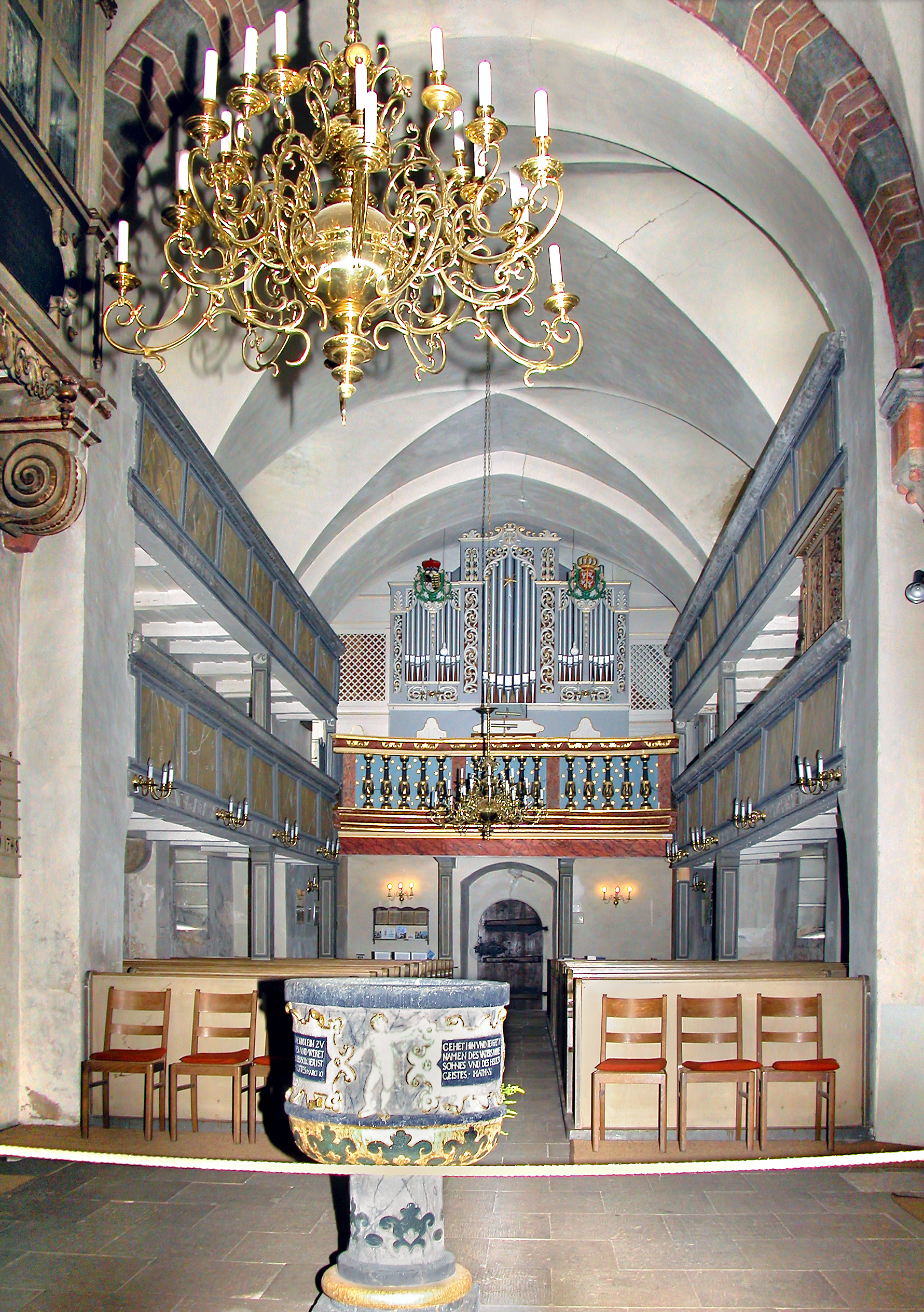 03.08.2007 01662 Meißen-Zscheila, Werdermannstraße 25 (GMP: 51.171379,13.491264): Trinitatiskirche Zscheila. 1512 wurde die Kirche um das Langhaus erweitert. Von 1655 - 1670 fanden größere Um- und Aufbauarbeiten statt. Das Langhaus wurde eingewölbt und der Südflügel entstand. Die Orgel von 1878 schuf die Firma U. Kreutzbach Söhne aus Borna. [DSCN28831.TIF]20070803070DR.JPG(c)Blobelt